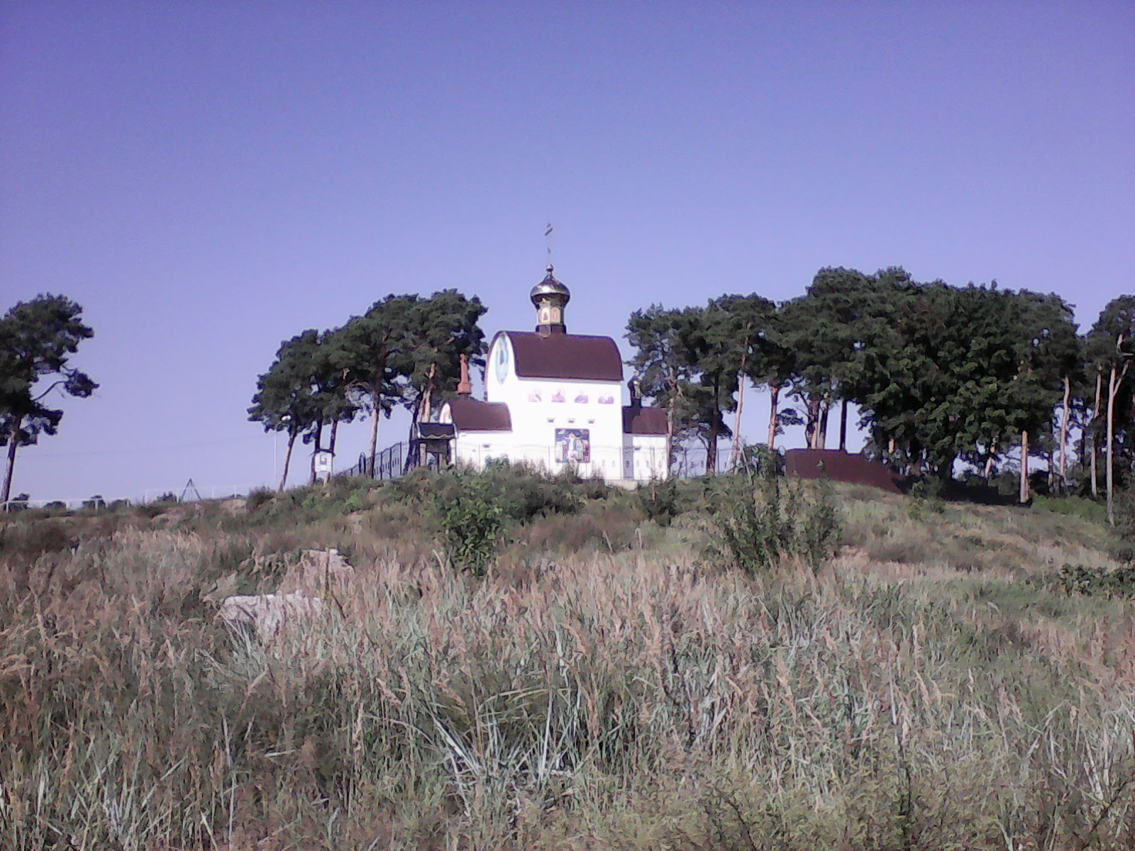 Храм-часовня на холме старого немецкого кладбища в посёлке Комсомольском города Светлого